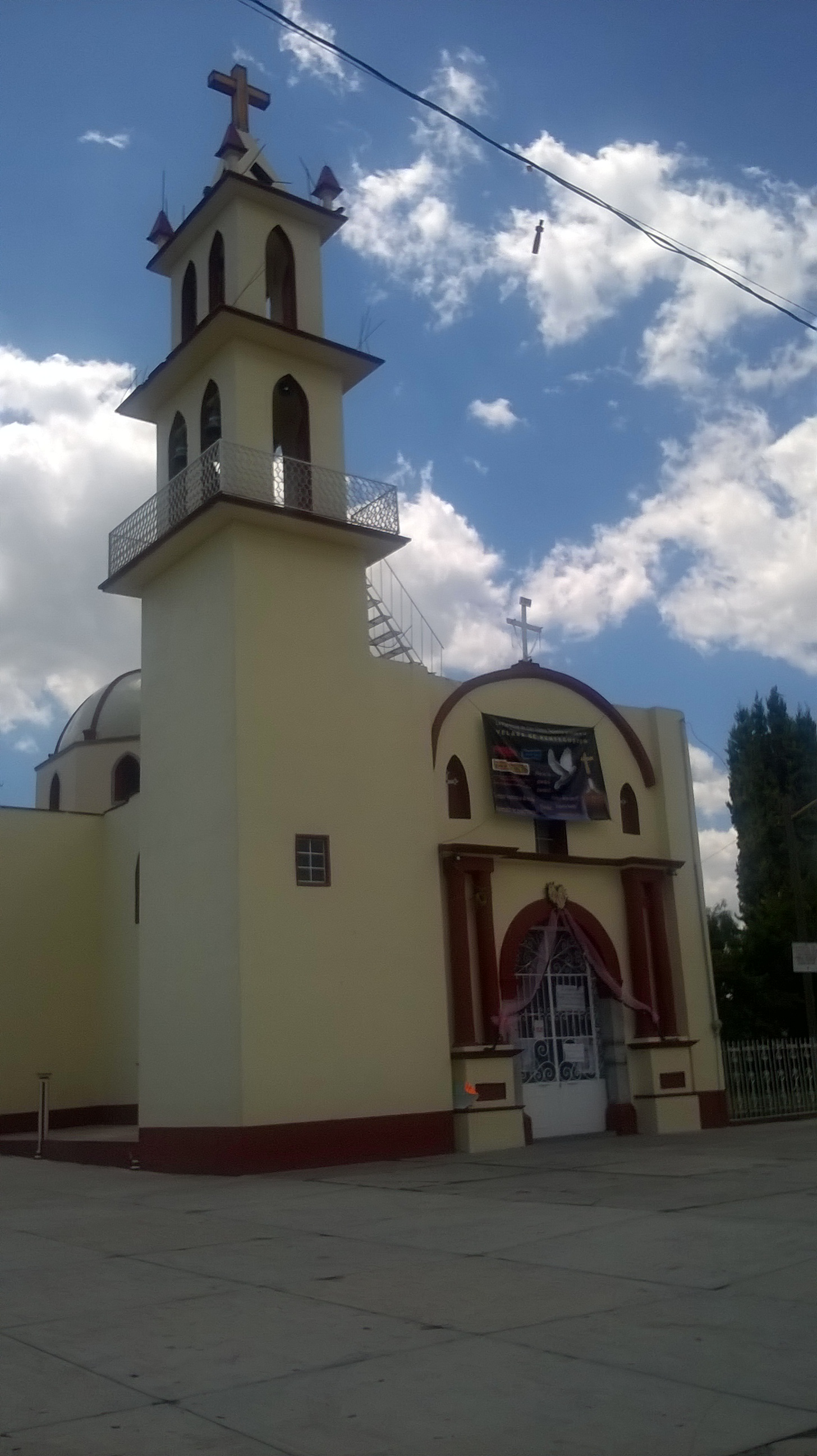 Capilla de Villa Alta, Tlaxcala